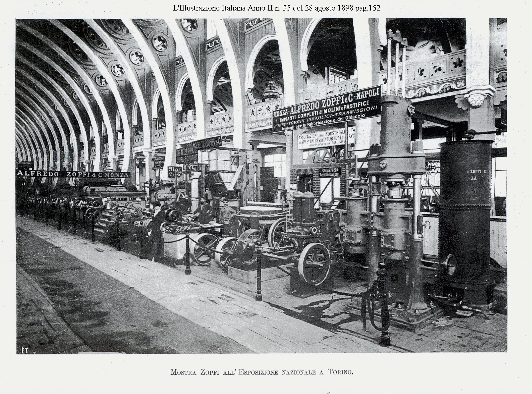 L'officina di costruzioni meccaniche di Alfredo Zopfi & C. alla esposizione nazionale di Torino 1898.